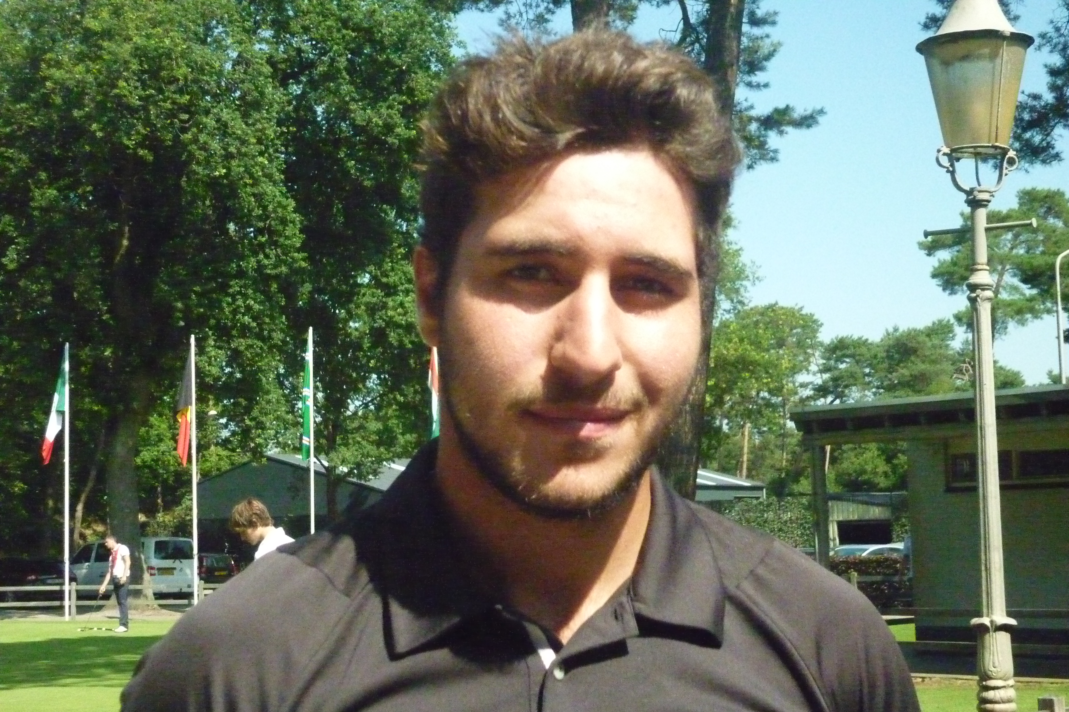 Ediz Kemaloglu